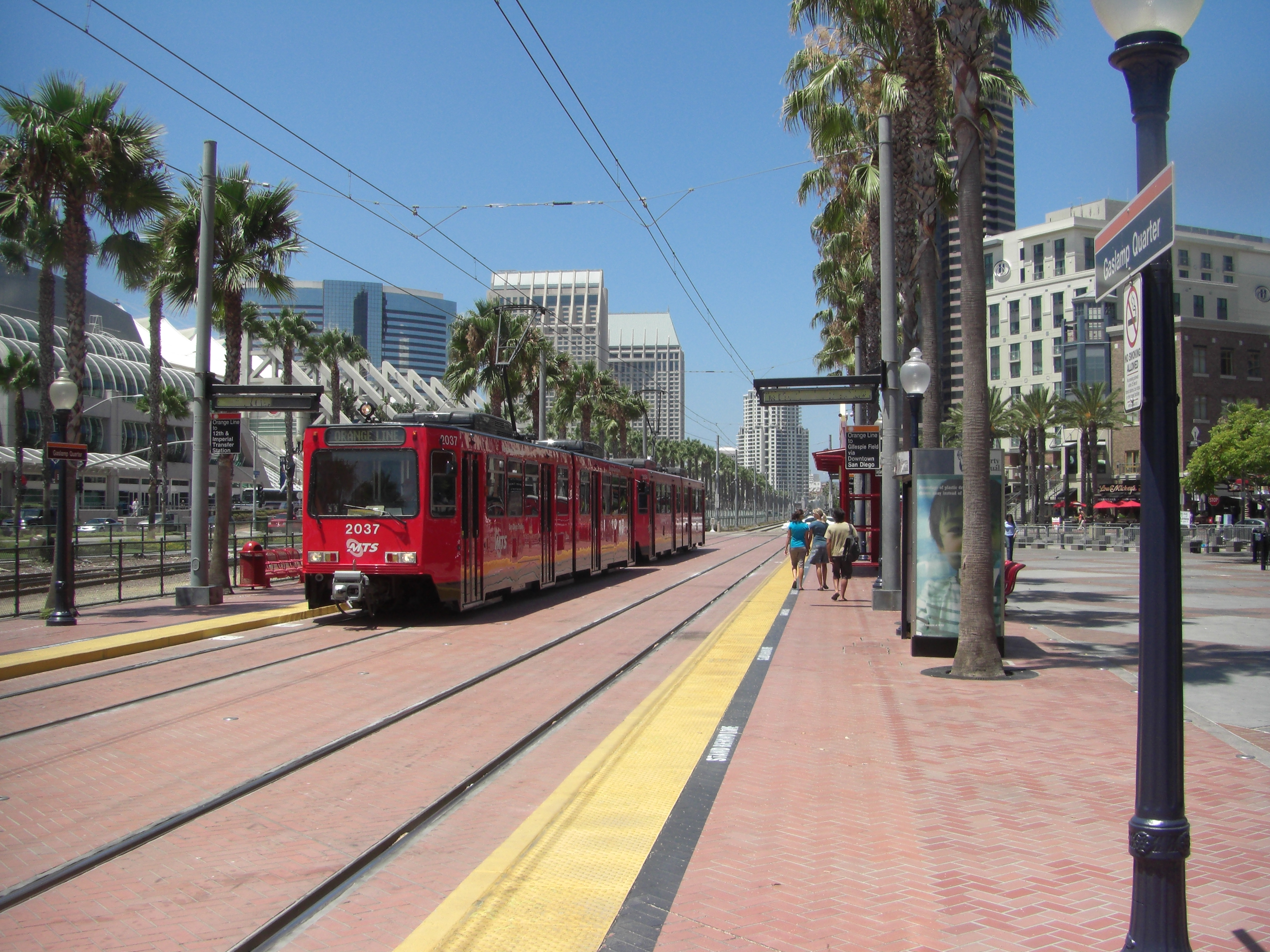 San Diego: tramvaj v typicky červené barvě